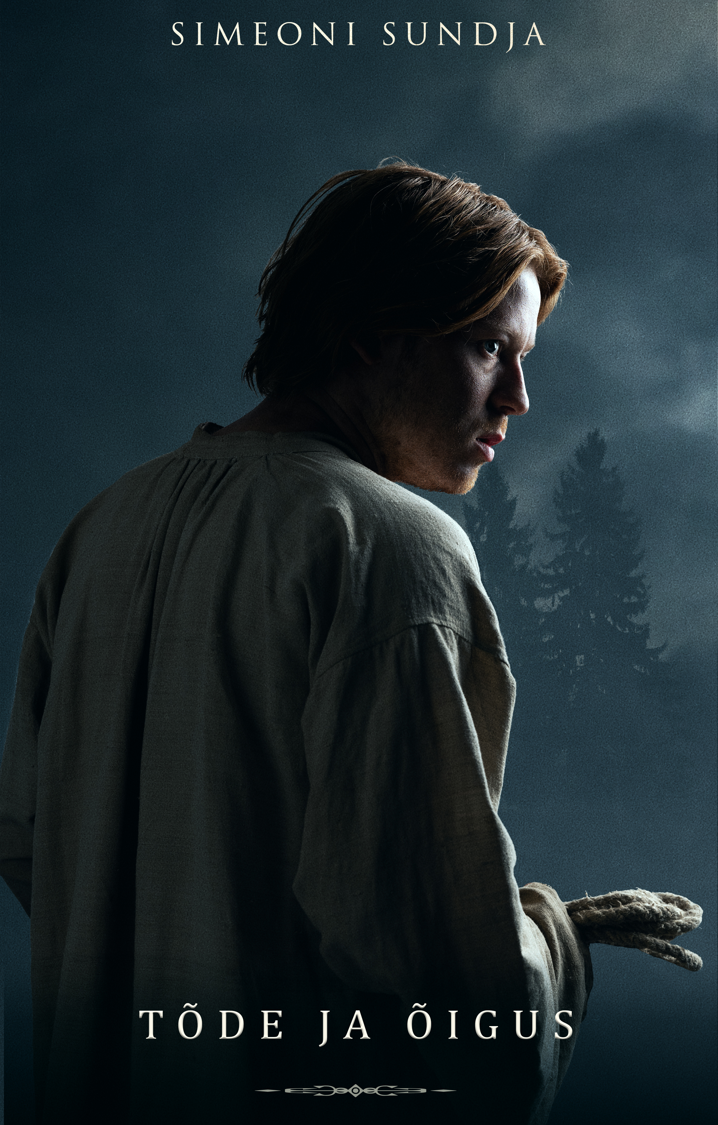 Simeoni Sundja filmis "Tõde ja õigus" Jussi osatäitjana